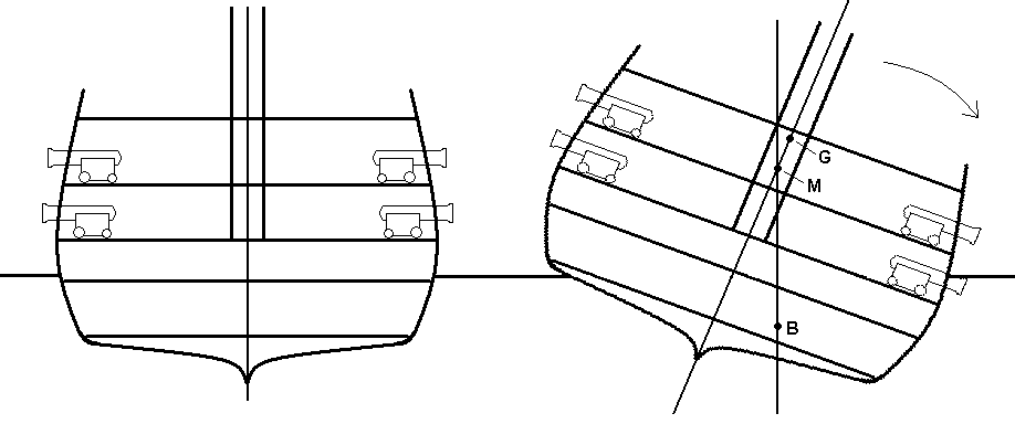 Skiss för att visa hur negativ metacentrisk höjd får skepp att välta, skissen ska föreställa HMS Vasa men är inte tekniskt korrekt utan ska endast påvisa funktionen av metacentrisk höjd inom skeppskonstruktion.